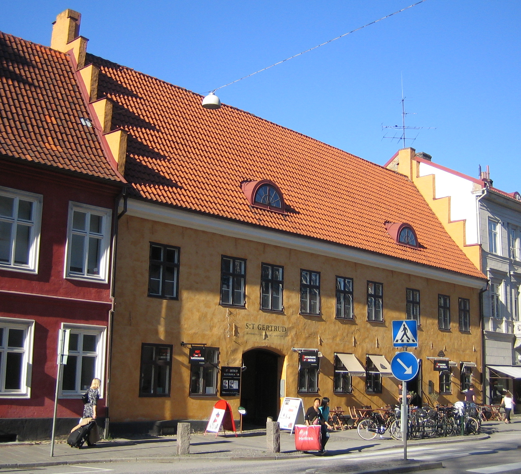 Niels Kuntzes hus, Kvarteret Sankt Gertrud, Malmö